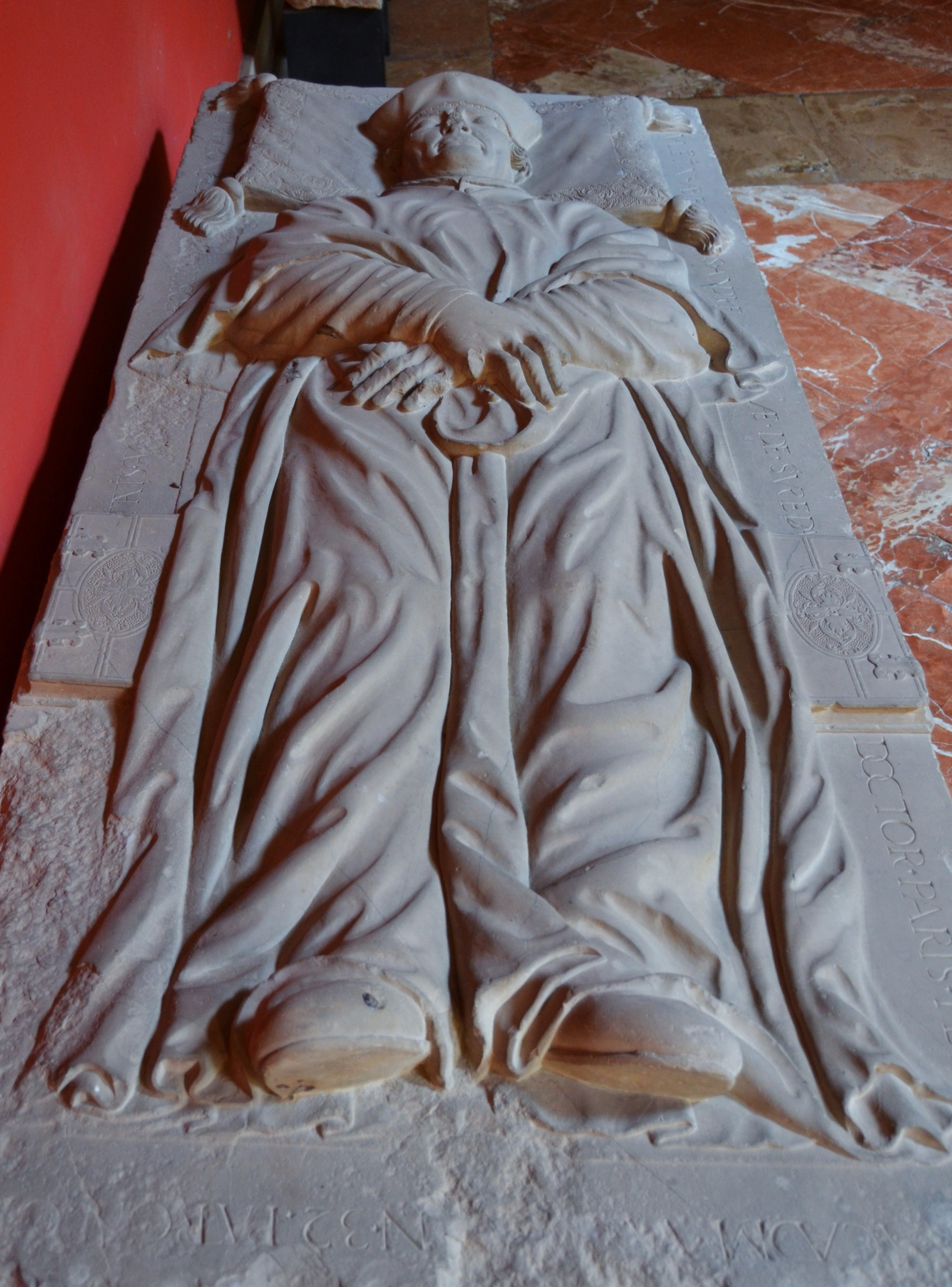 Lastra funerària del doctor Joan Salaia o Celaya, ca. 1558, marbre, 30 x 202 x75,5 cm. Museu de Belles Arts de València.